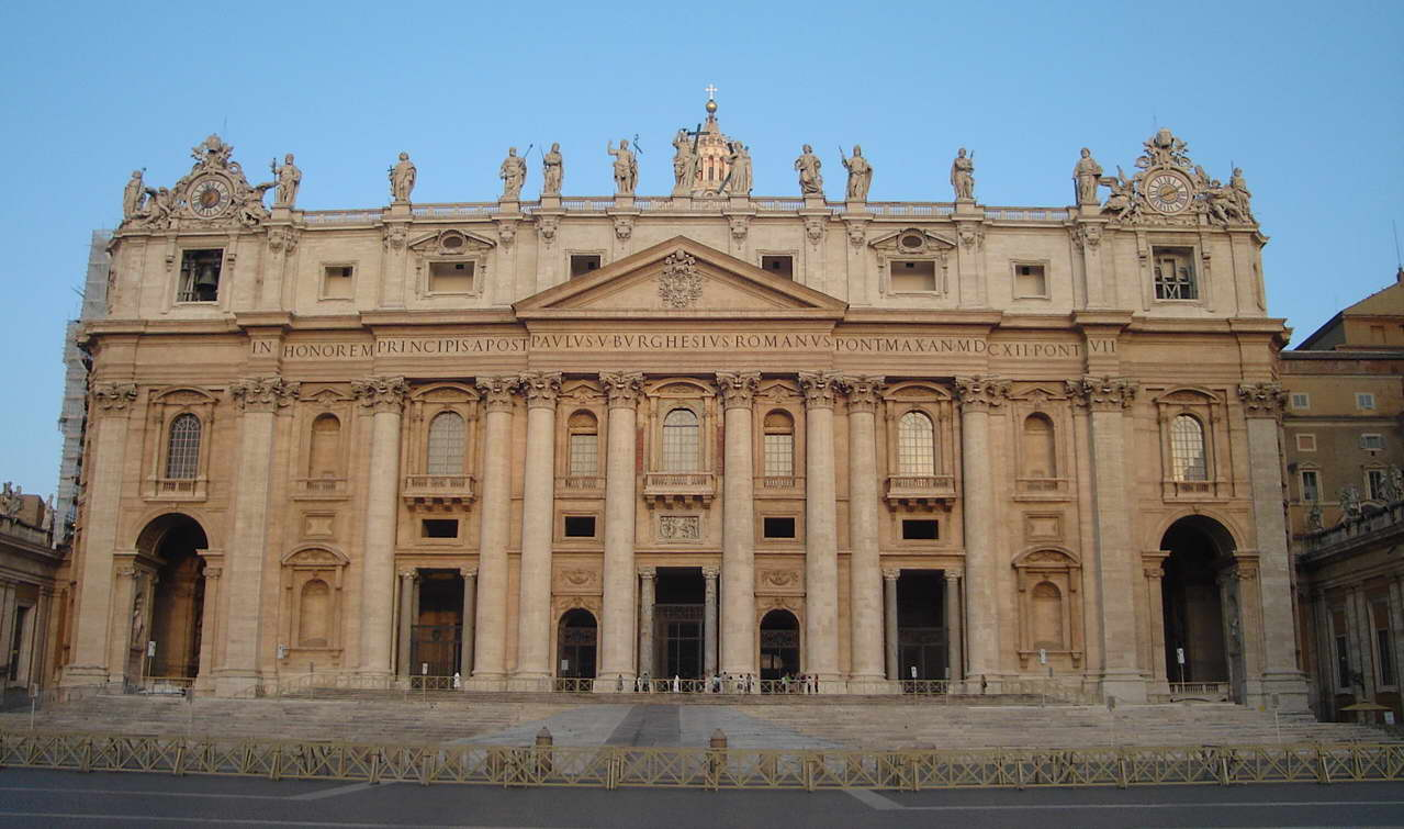 St. Peter's Basilica